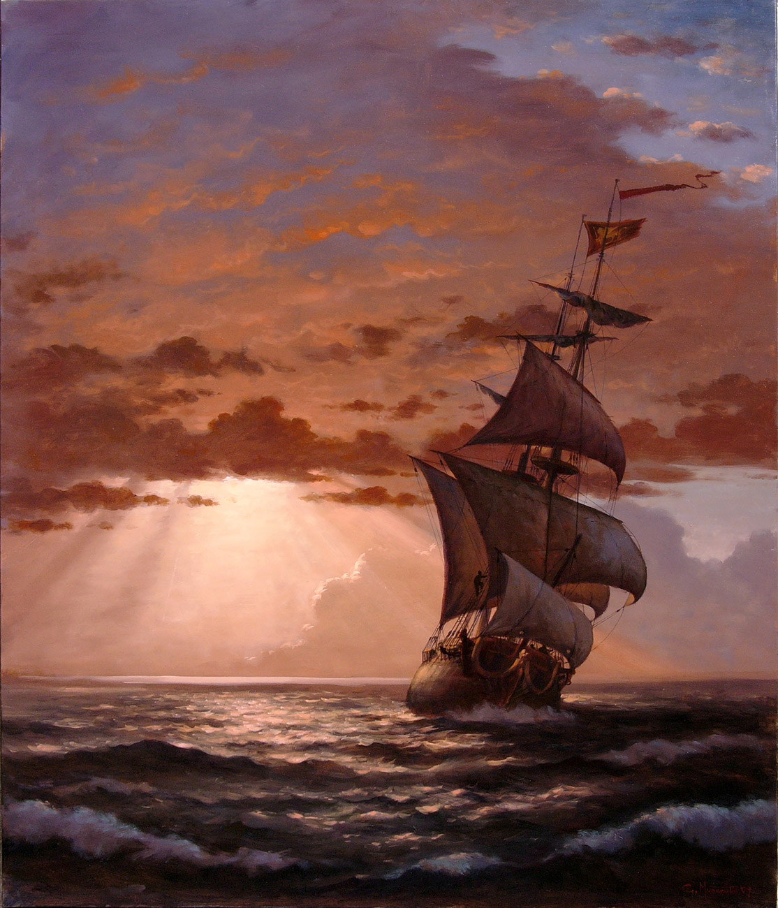 Ritorno dal Levante (Gianfranco Munerotto, Fregata Veneziana da 30 cannoni, olio su tela, cm 80 x 60, Venezia)